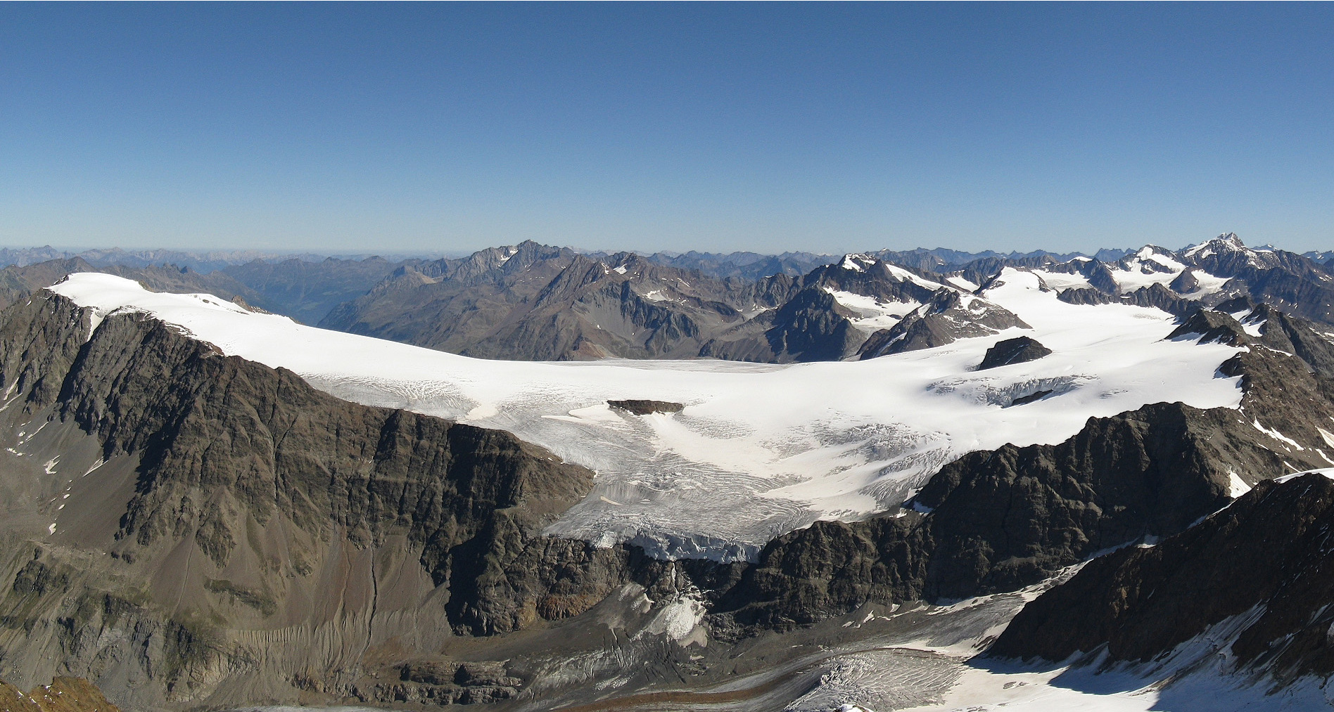 dalla cima della Palla Bianca